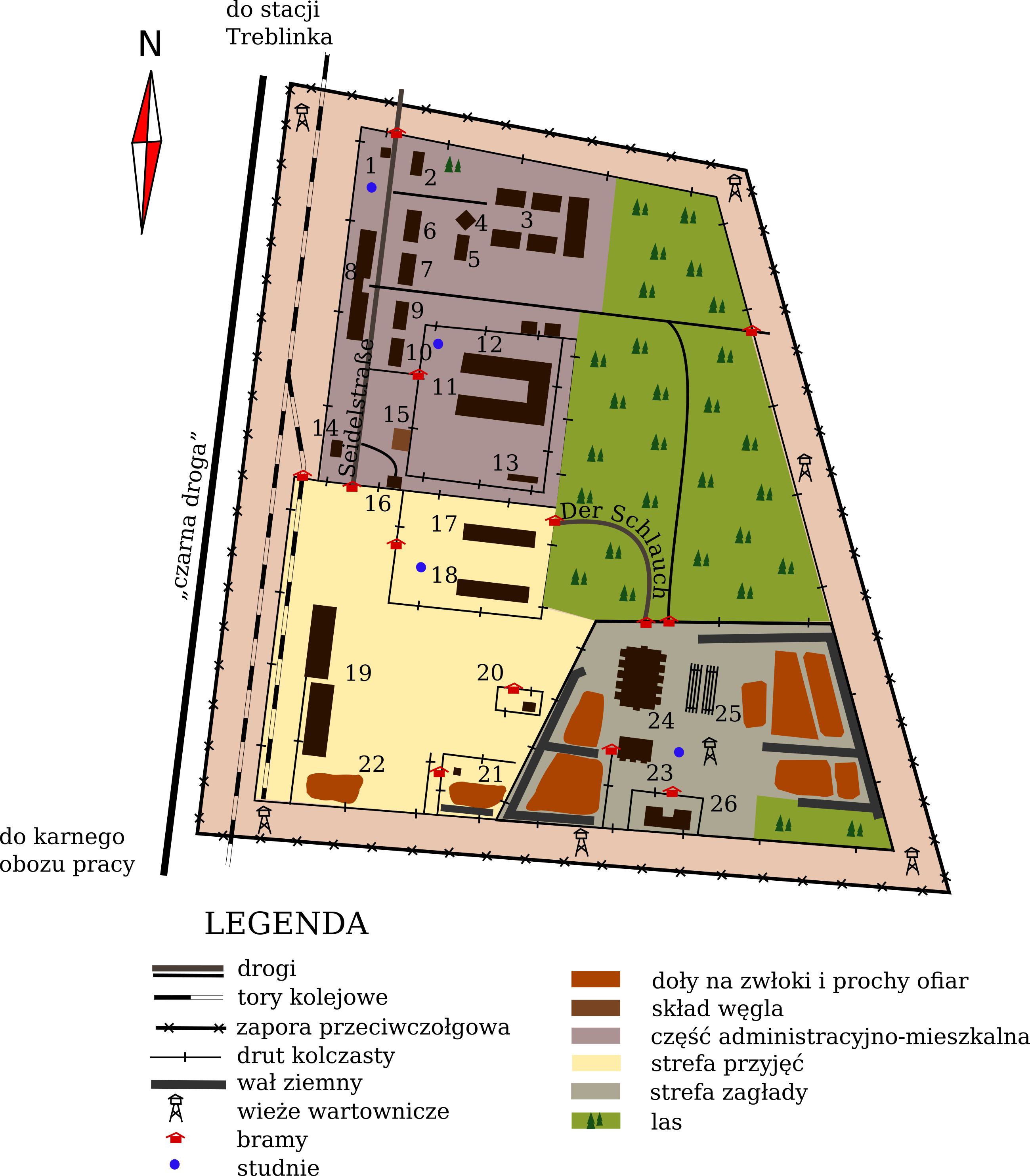 Plan obozu koncentracyjnego w Treblince Legenda: 1 wartownia 2 komendantura i kwatera komendanta 3 koszary wachmanów 4 „zoo” 5 sortownia kosztowności 6 pomieszczenie lekarza, dentysty i fryzjera dla SS-manów 7 barak dla służących (Polek i Ukrainek) 8 kwatery SS-manów i zbrojownia 9 magazyn tkanin 10 piekarnia 11 baraki więźniów 12 stajnia i chlew 13 latryna na placu apelowym 14 skład paliw 15 garaż 16 skład węgla 17 rozbieralnia dla kobiet i dzieci 18 rozbieralnia dla mężczyzn 19 magazyn posortowanych rzeczy ofiar (zakamuflowany jako stacja kolejowa) 20 latryna na placu sortowniczym 21 „lazaret” 22 dół, w którym chowano zmarłych podczas transportu 23 stare komory gazowe 24 nowe komory gazowe 25 ruszty do palenia zwłok 26 barak więźniów Żródła